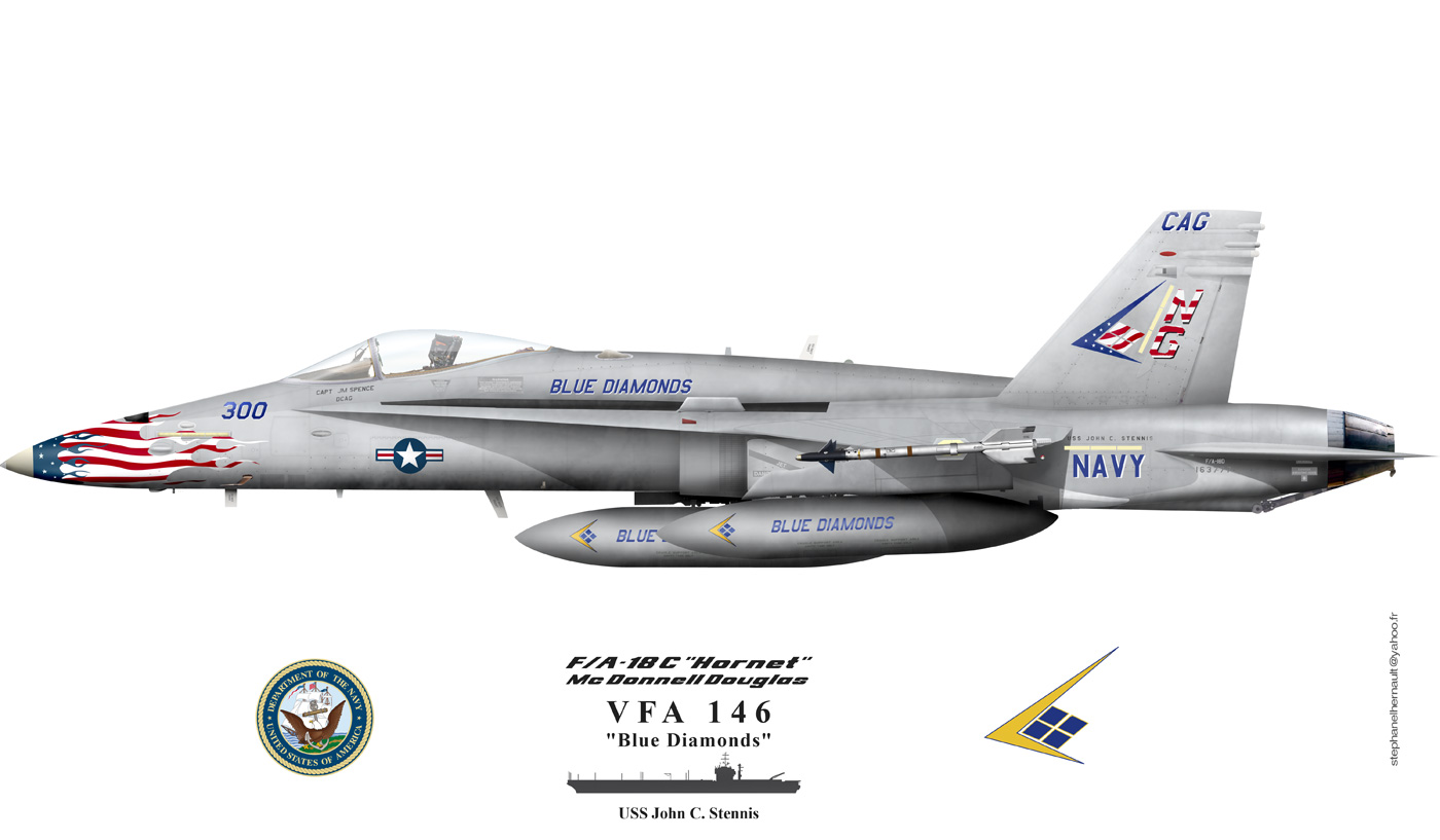 VFA 146 F/A 18C "Blue diamonds" color scheme